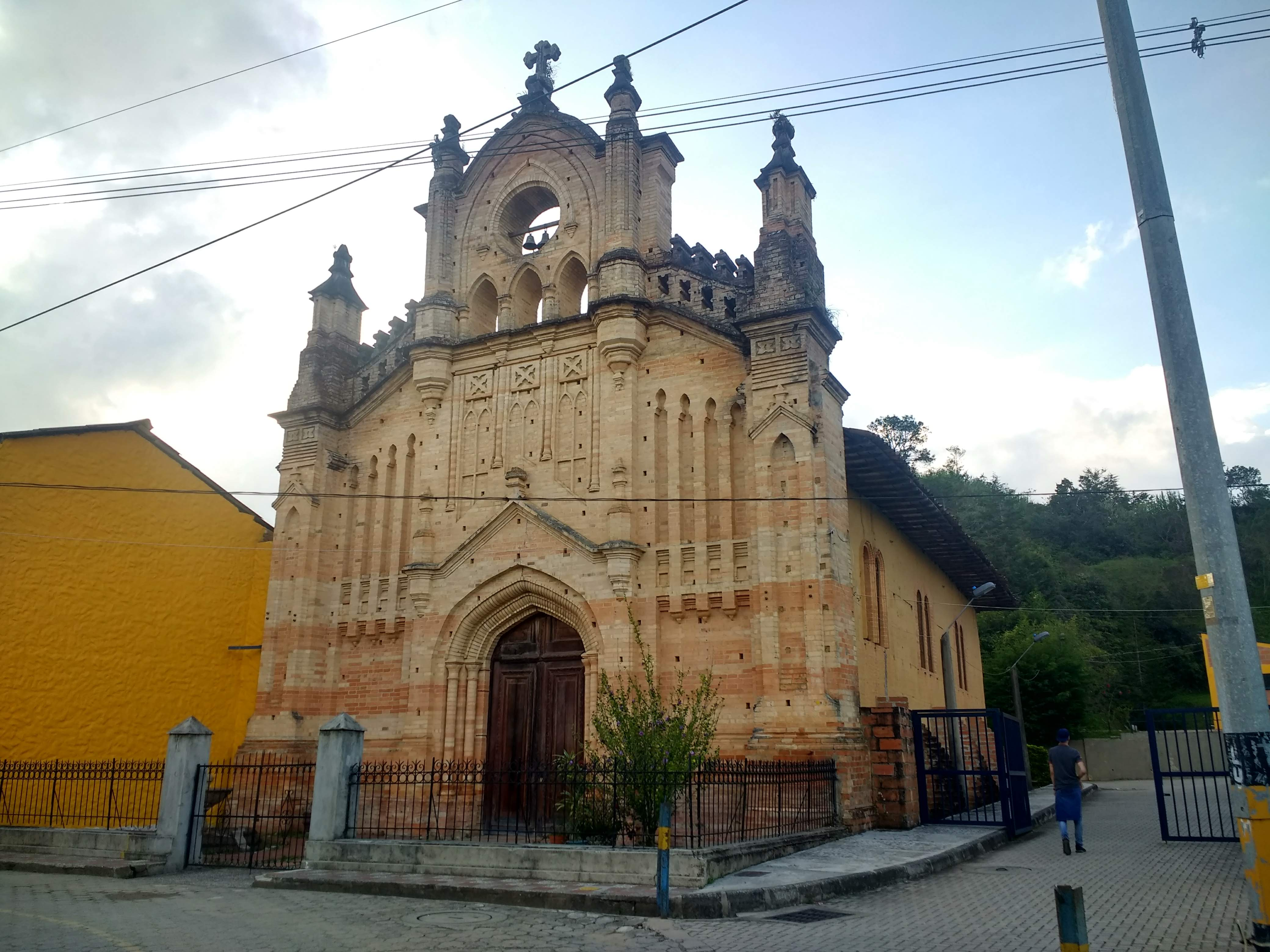 Capilla del Sagrado Corazón (Santo Domingo, Antioquia)